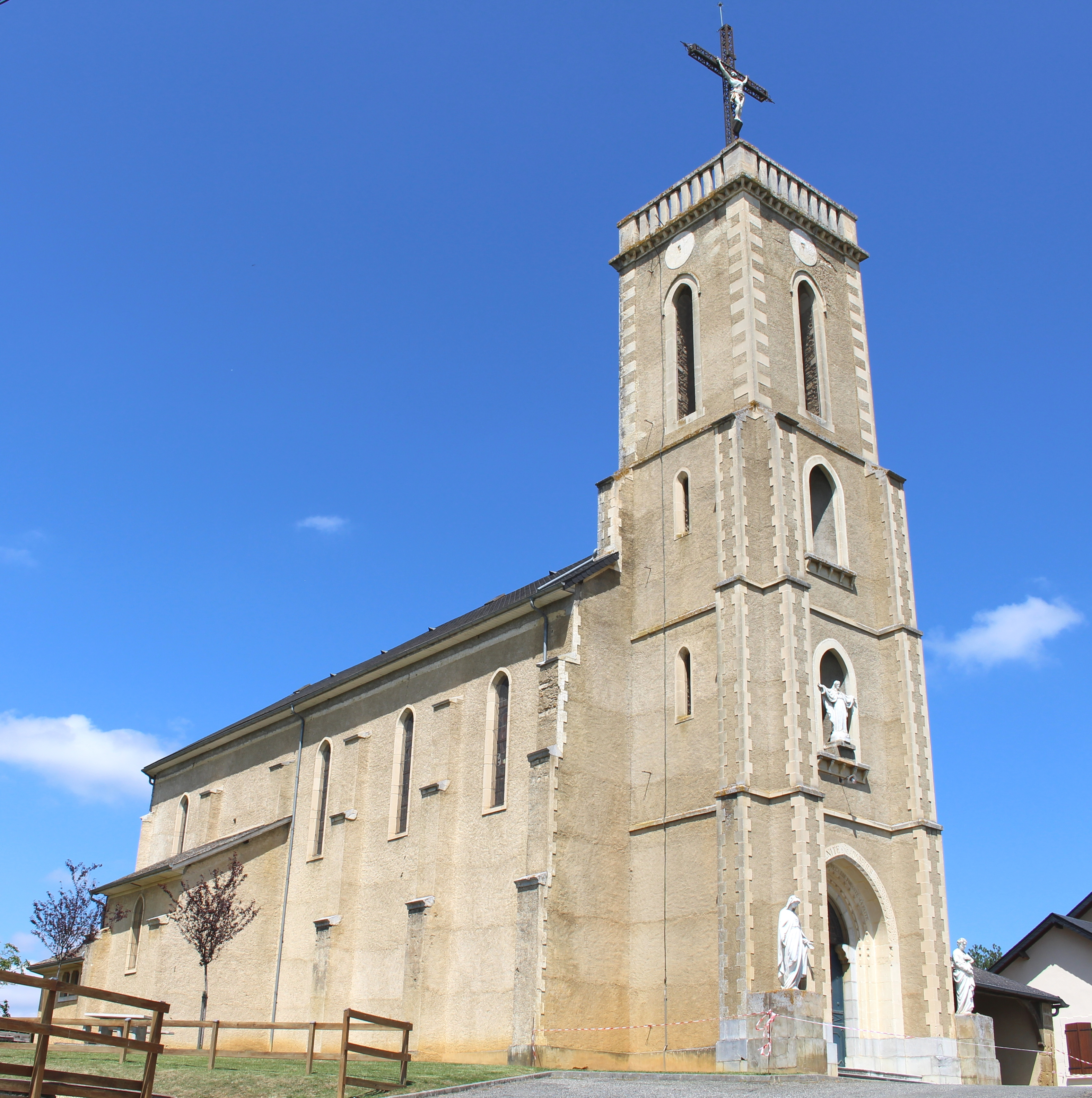 Église Saint-Martin de Libaros (Hautes-Pyrénées)